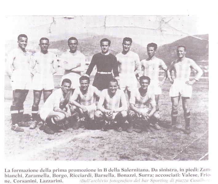 Salernitana 37-38